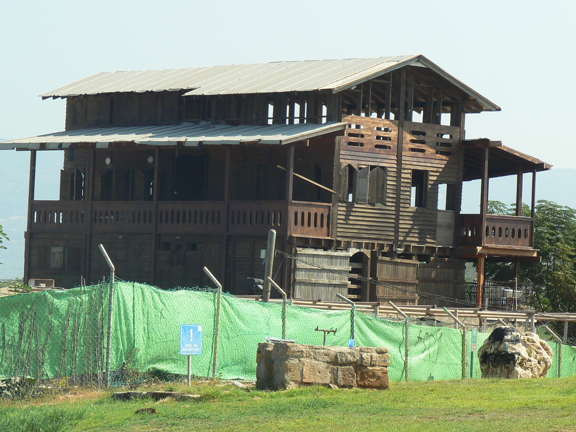 הבית במדינת אכזיב